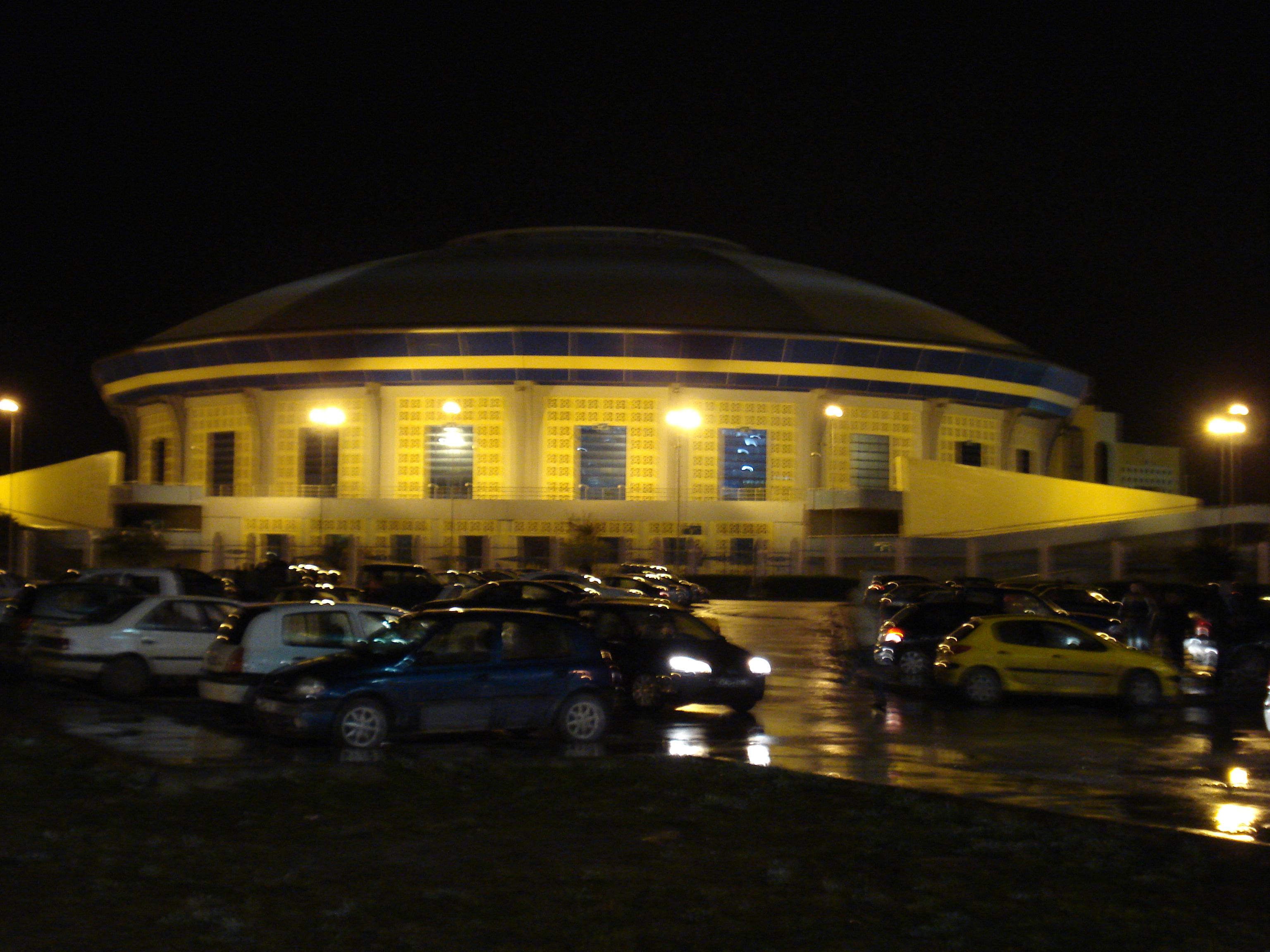 Salle des sports de Radès, Tunis, Tunisia